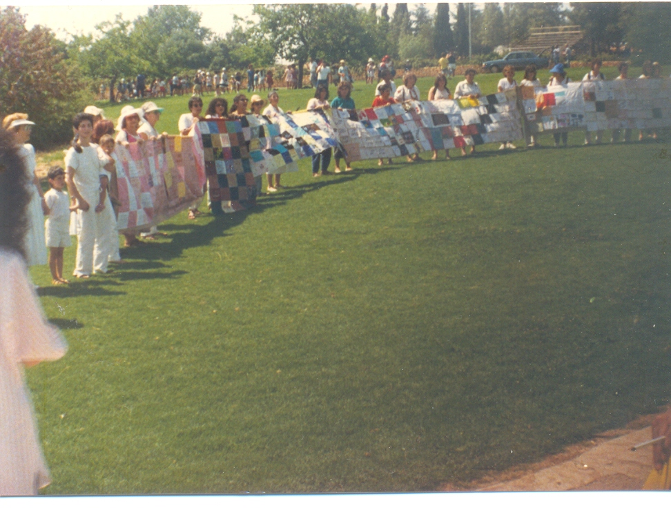 מפת השלום ירושלים 1988 מול הכנסת